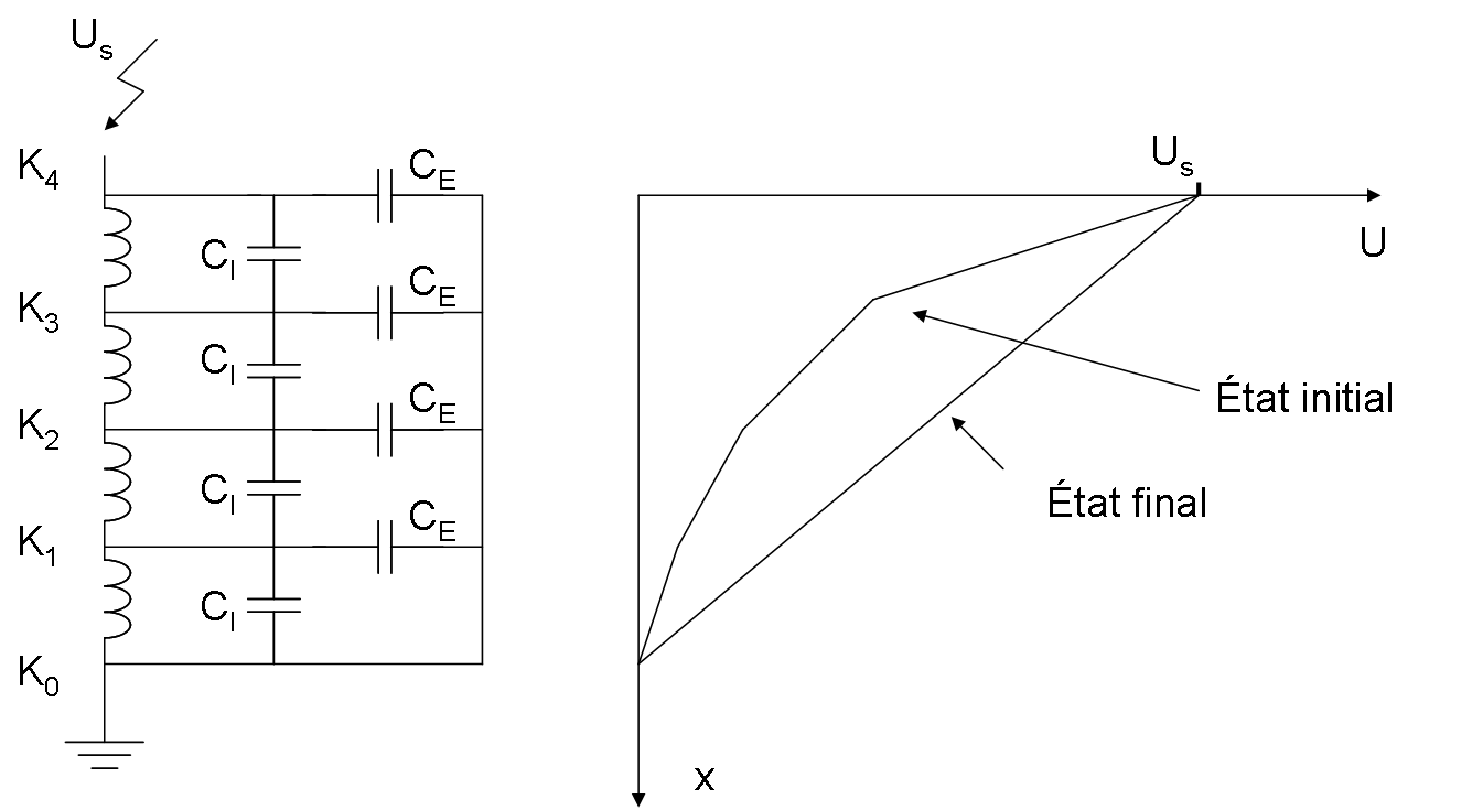 Comportement capacitif des enroulements d'un transformateur lors de surtensions transitoires.